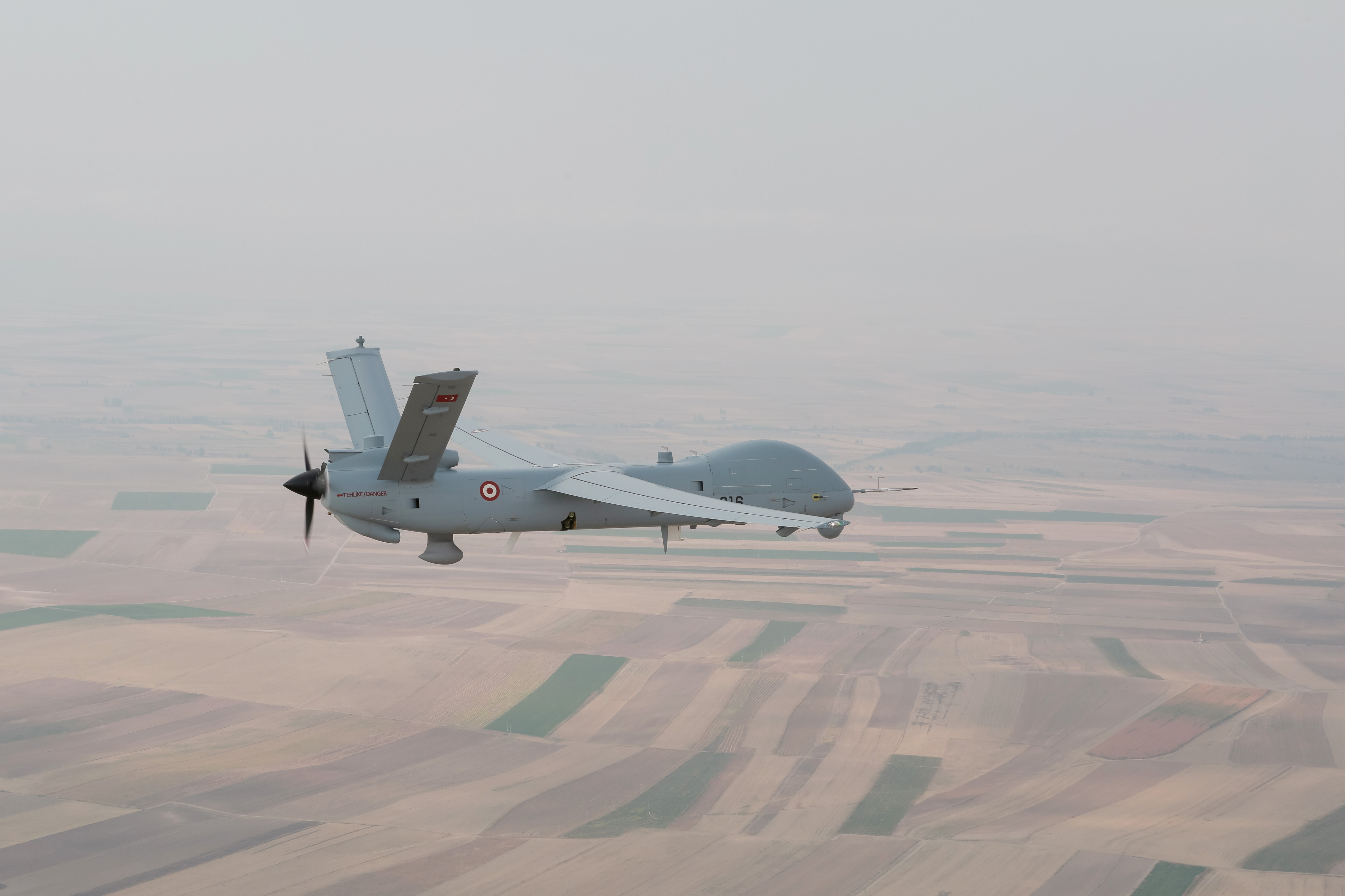 ANKA İnsansız Hava Aracı